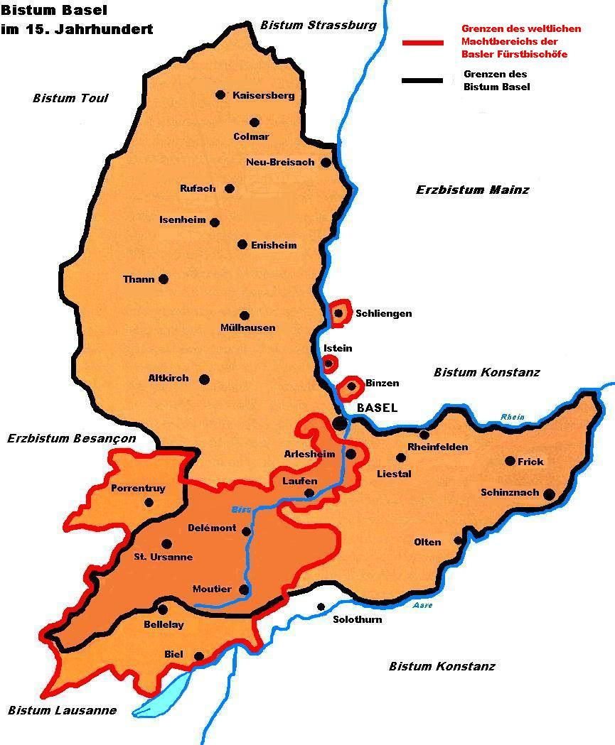 Karte des Bistum Basel